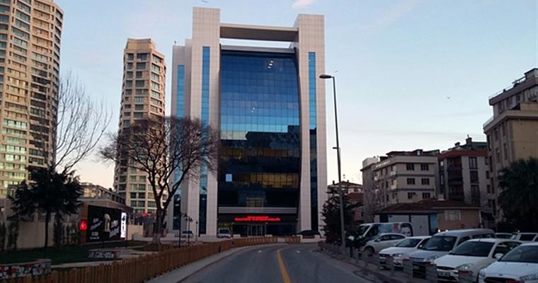 2016 yılında hizmete giren Maltepe Hükümet Konağı